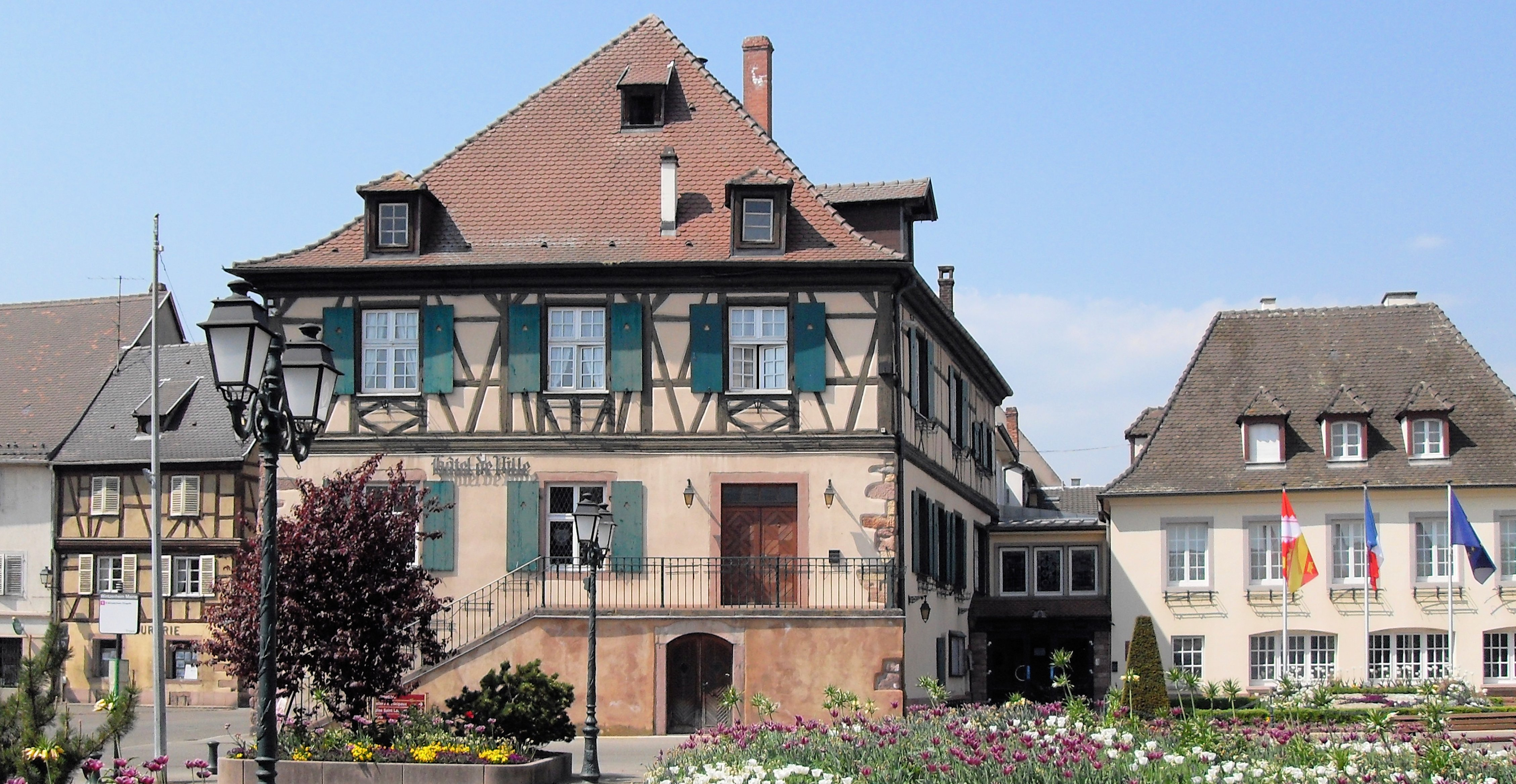 L'hôtel de ville de Wintzenheim